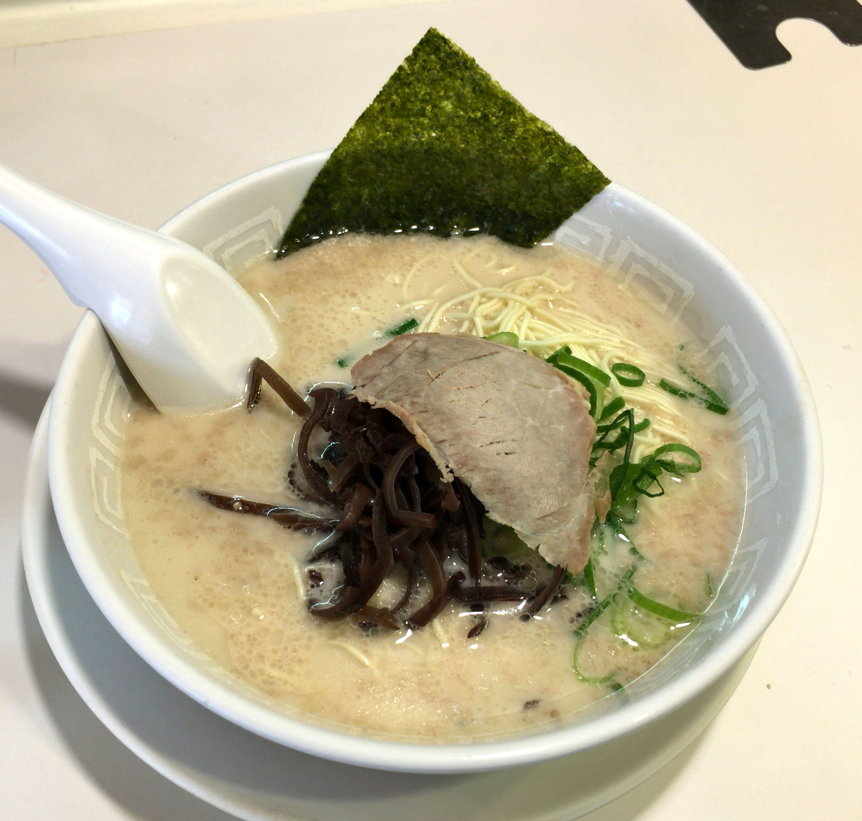 博多天神のラーメン